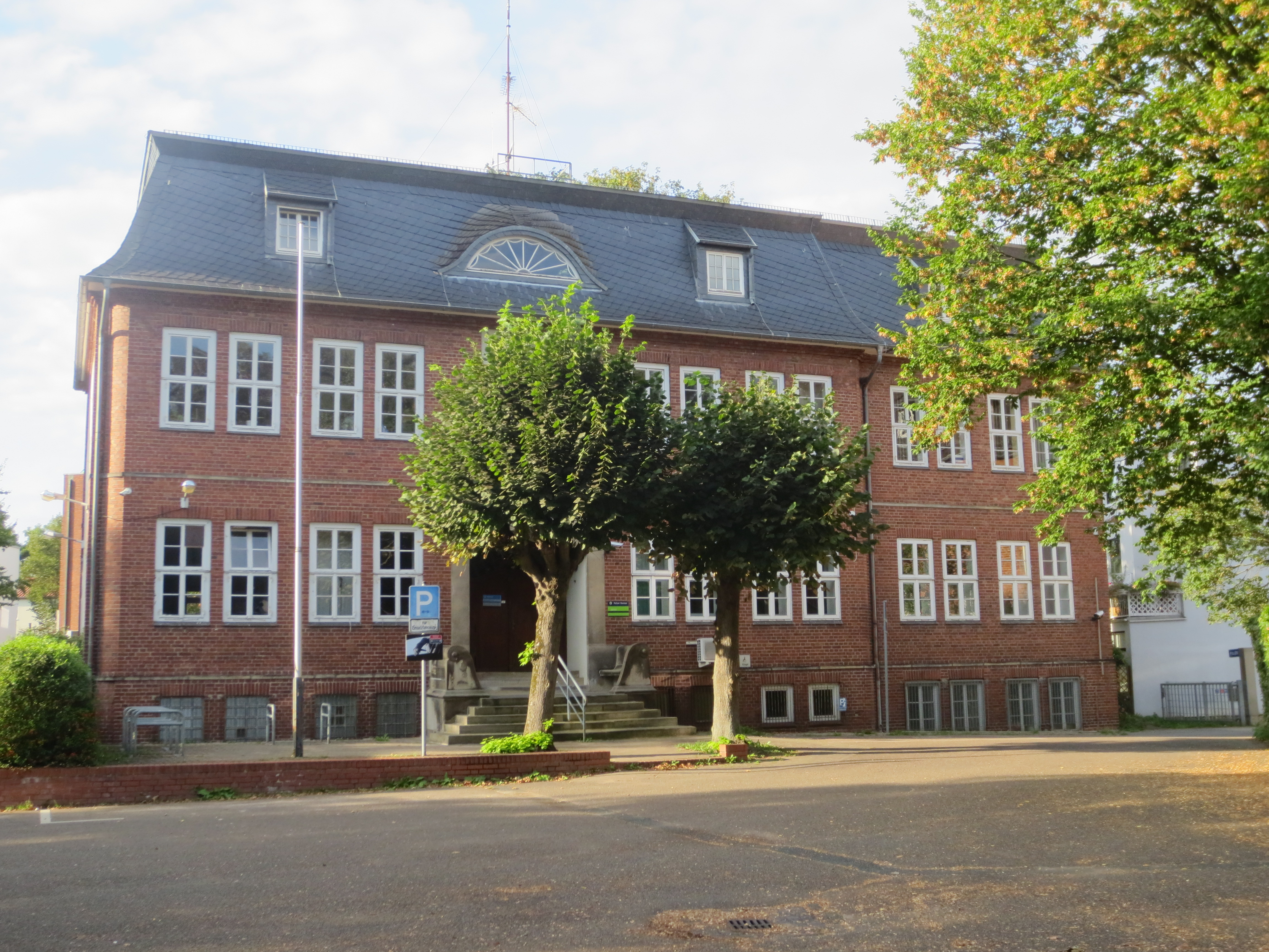 Lyzeum Schomburg in Bremen, Hoyaer Straße 11Das abgebildete Objekt ist ein geschütztes Kulturdenkmal in der Freien Hansestadt Bremen, mit der Nr. 0215 beim Landesamt für Denkmalpflege registriert.